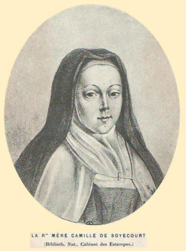 Gravure de mère Camille de Soyécourt